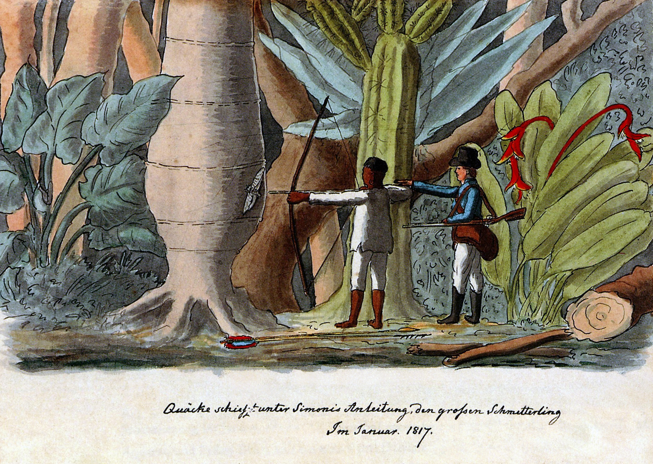 Der Botokude-Indianer Joachim Quäck (Quäck = portugiesisch: Kuêk, ursprünglich: Nuguäck) (* vermutlich um 1800 im brasilianischen Bundesstaat Minas Gerais in Brasilien; † 1. Juni 1834 in Neuwied) traf 1817 als Minderjähriger den deutschen Entdecker, Ethnologen, Zoologen und Naturforscher Prinz Maximilian zu Wied-Neuwied in Brasilien. Quäck wurde für Maximilian zum einheimischen Reisebegleiter, der ihm das für seine Forschungen notwendige Hintergrundwissen vermittelte. Dieses Aquarell von Maximilian, das er im Januar 1817 malte, zeigt Quäck mit Pfeil und Bogen bei der Jagd auf große Schmetterlinge. Quäck befindet sich in der Gesellschaft des bewaffneten Gärtners Christian Simonis vom Schloß Neuwied, und auf Weisung von Maximilian verwendet Quäck bei seiner Schmetterlingsjagd einen stumpfen Pfeil, damit er die Schmetterlinge nur betäubt und nicht zerstört. Maximilian beschrieb diese Schmetterlingsjagd in seinem Werk "Reise nach Brasilien in den Jahren 1815 bis 1817", veröffentlicht im Verlag Heinrich Ludwig Brönner, Frankfurt 1820–1821, Band 2, Seite 130-131. Dort betont Maximilian, dass Quäck sich in dieser sonderbaren Art der Jagd eine große Fertigkeit erworben habe. Maximilian ließ Quäck ein Jahr später nach Europa nachkommen. Am 12. Februar 1818 kam Quäck in Neuwied an. Dort arbeitete er für Maximilian als dessen persönlicher Kammerdiener. Quäck verstarb im Alter von 34 Jahren am 1. Juni 1834 um 9 Uhr morgens an einer Leberentzündung und wurde am 3. Juni 1834 (vermutlich auf dem Alten Friedhof von Neuwied) katholisch beerdigt.